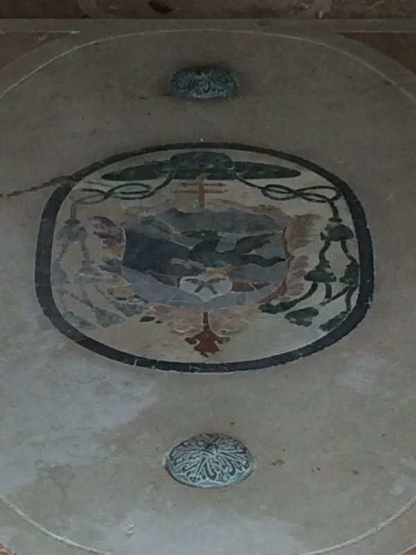 Герб Змаевичей